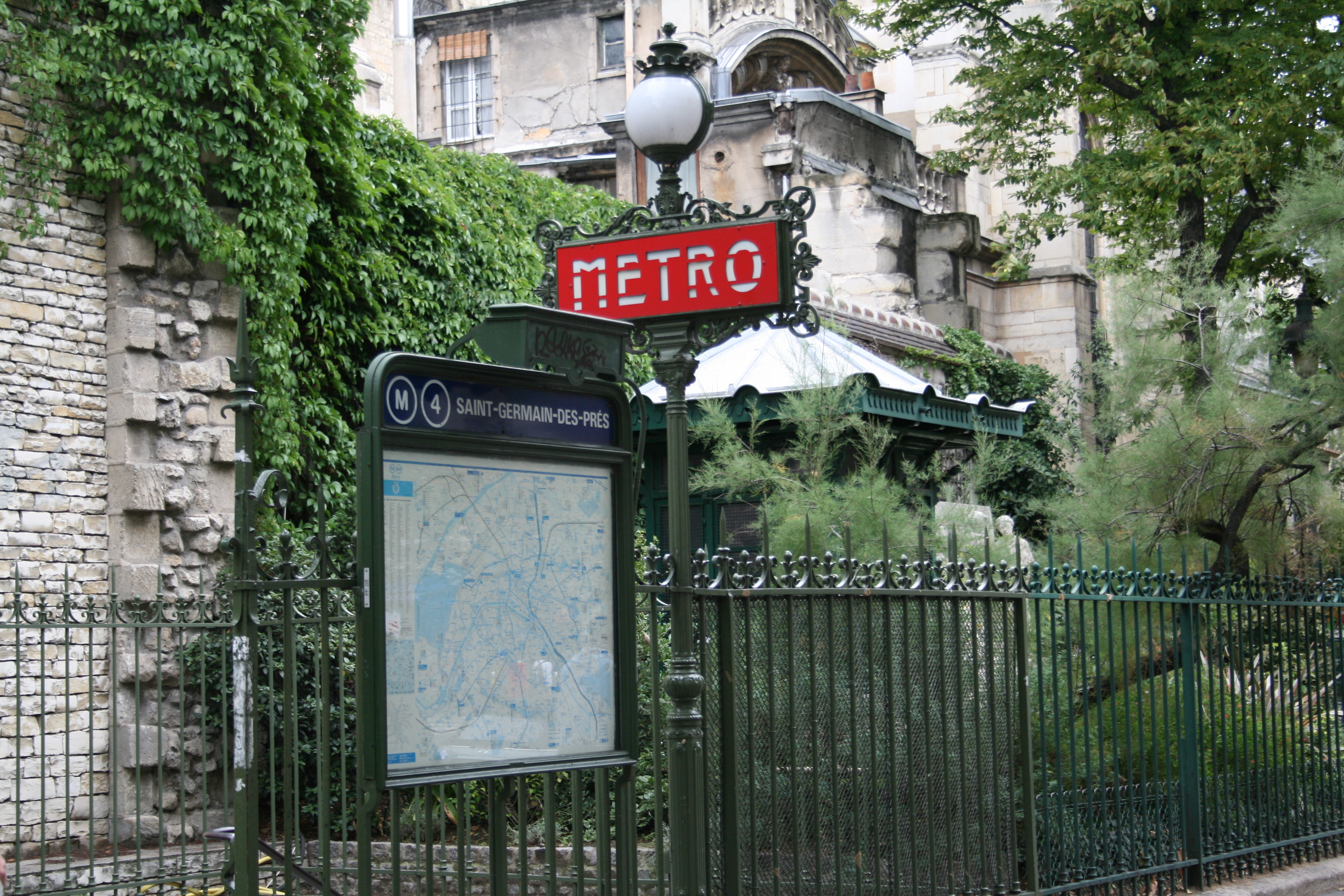 Metro Saint-Germain-des-Prés, Paris.